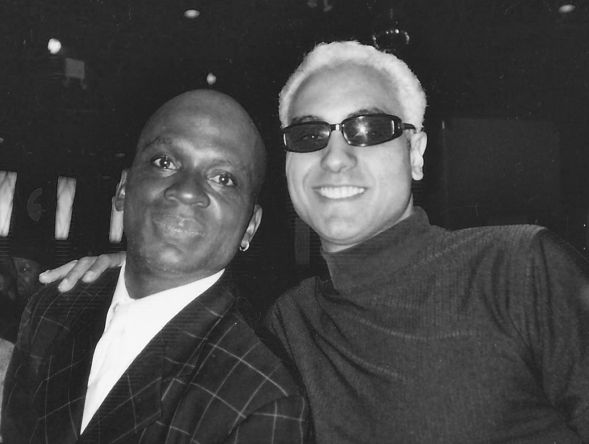 Avec Jerome Benton, chanteur du groupe "The Time" - 2002